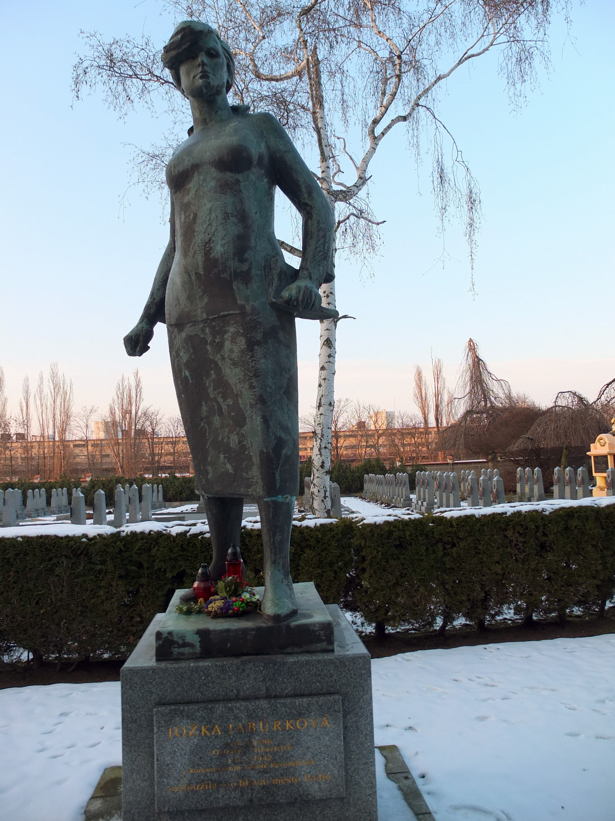 Pomník Jožky Jabůrkové, Olšanské hřbitovy